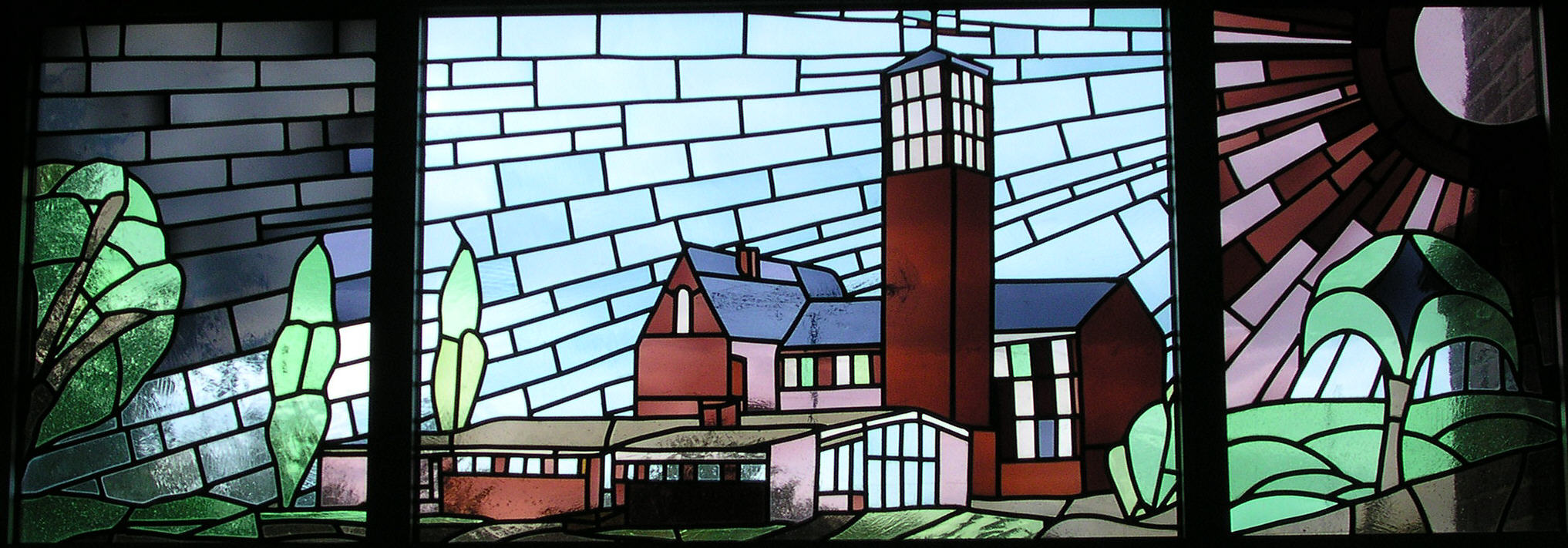 Lindern (Geilenkirchen), Kirchenfenster mit Darstellung der rk. Kirche St. Johann Baptist